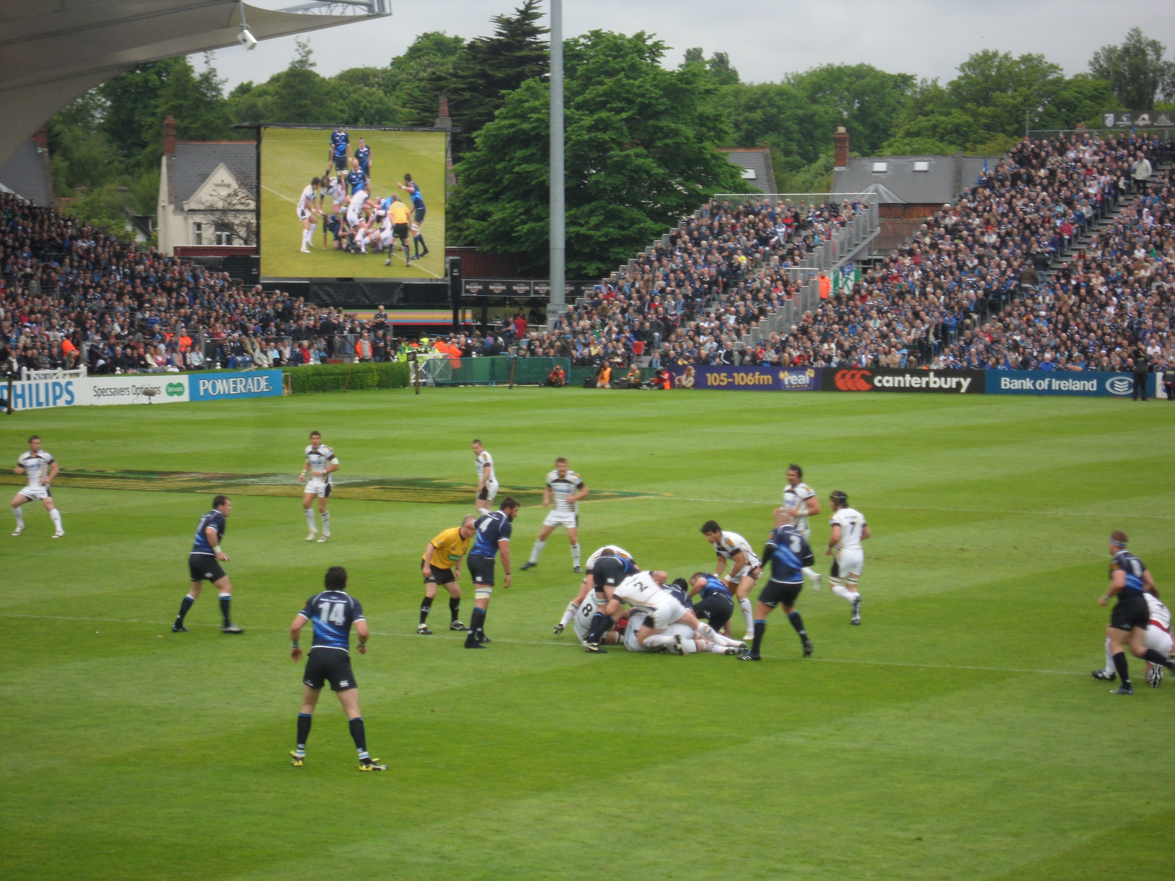 Leinster Rugby vs Ospreys. 29 may 2010 Ospreys 17 - 12 Leinster at RDS Arena, Dublin.